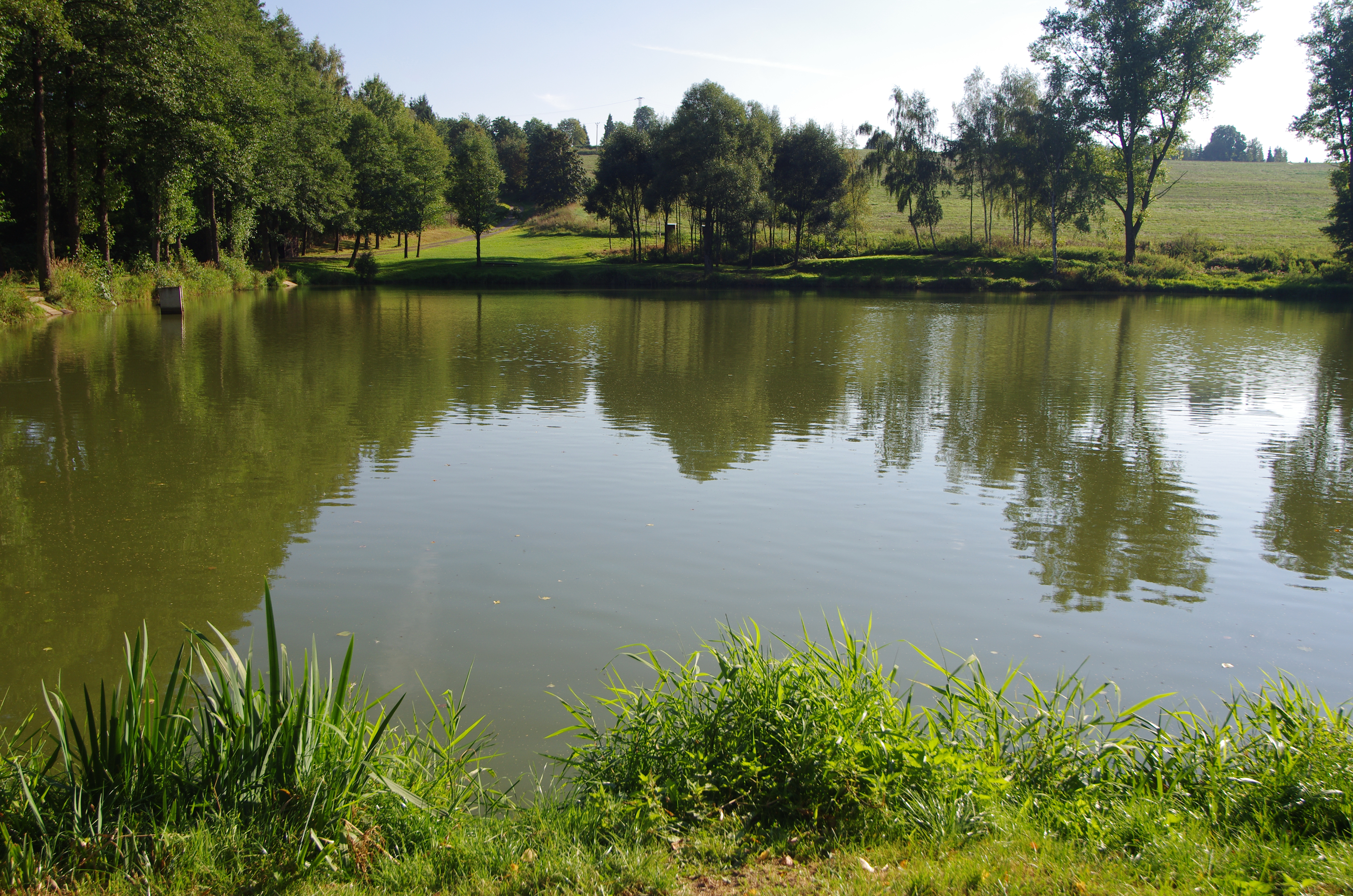 Dolina, místní část obce Krajková, rybníček na Dolinském potoce, okres Sokolov